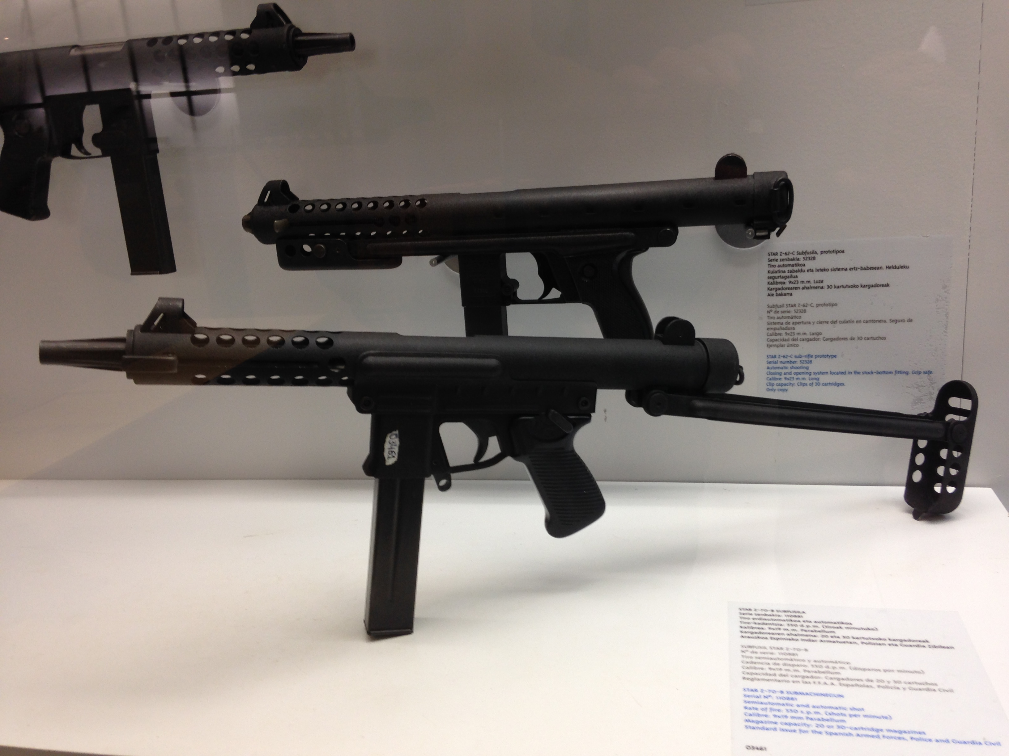 Museo de la Industria Armera de Éibar. Subfusil Z-70 fabricado por STAR de Eibar.